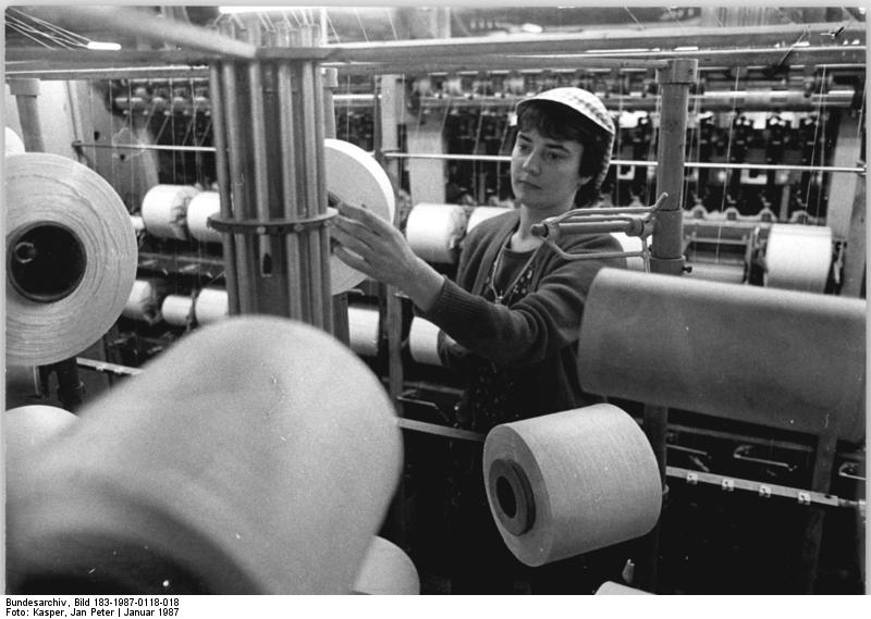 ADN-ZB-Kasper 18.1.1987 -Cottbus: Wetter-Sonderschichten. Bis zu 45 Prozent ihrer sonst üblichen Tagesleistung erzielten bei Sonderschichten insgesamt die Kollektive im Textilkombinat Cottbus, die am Wochenende das stabile Angebot an Elektroenergie und Dampf zur Aufholung von Produktionsrückständen nutzten. In ihrer Abteilung Texturierung war auch die 23jährige Zwirnerin Carola Kupka im Einsatz.